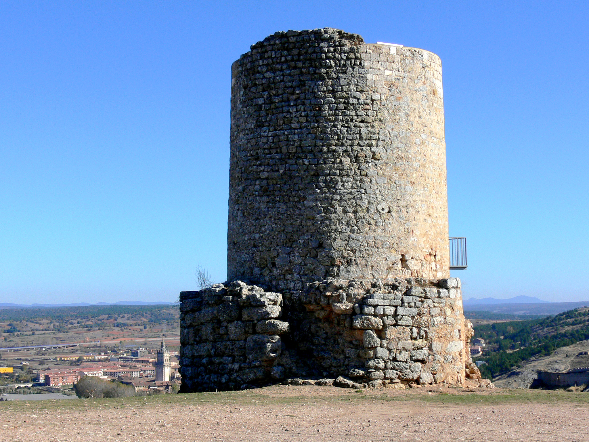 Atalaya de Uxama en El Burgo de Osma, Soria - España.